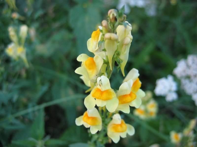 Gewöhnliches Leinkraut Linaria vulgaris